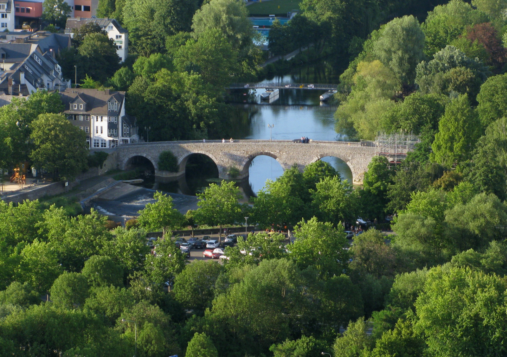 Alte Lahnbrücke in Wetzlar, aufgenommen vom Kalsmunt aus (Privatarchiv)